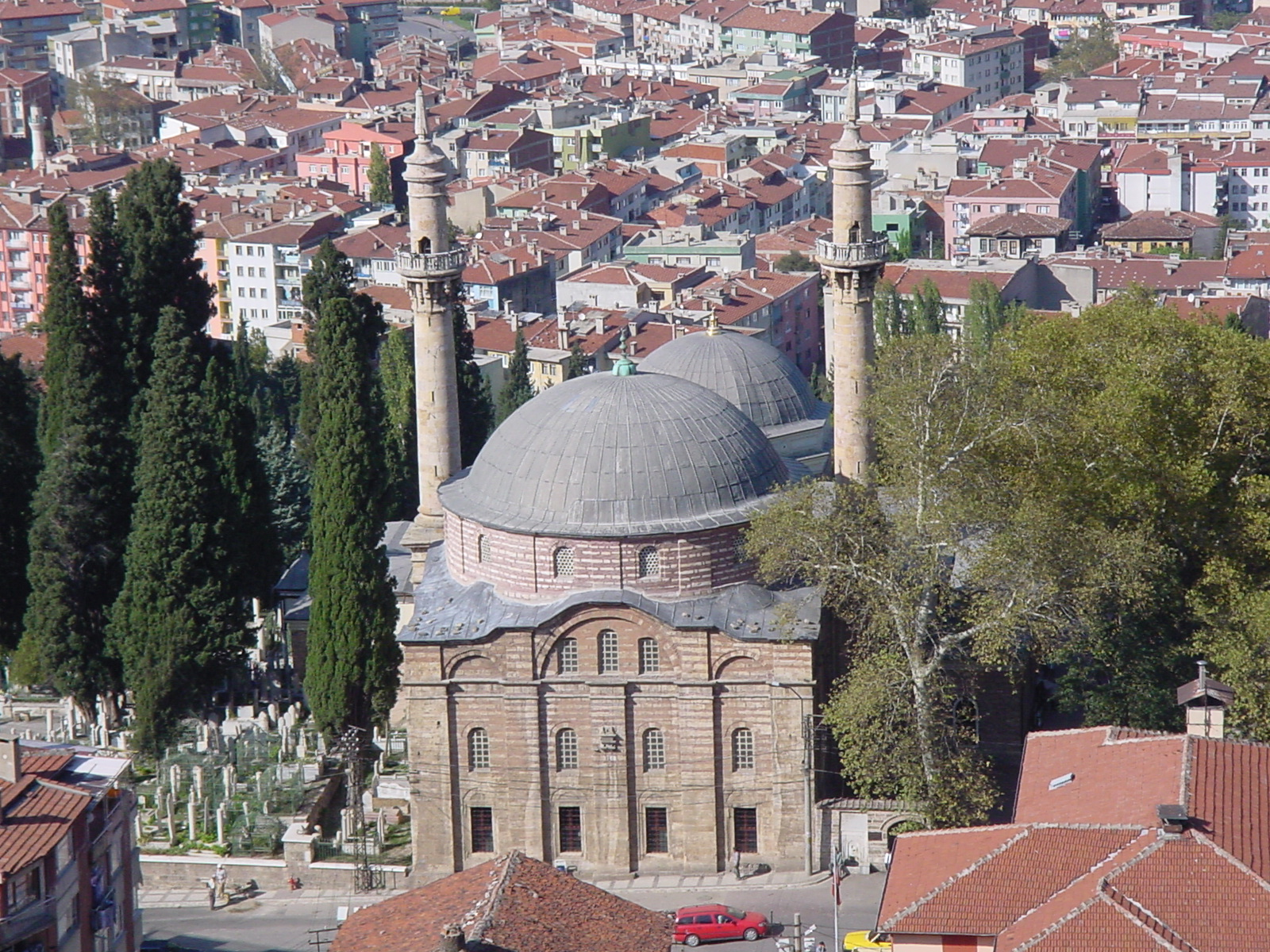 EMİRSULTAN CAMİİ